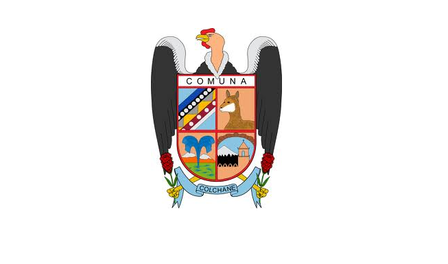 Bandera de la Municipalidad de Colchane